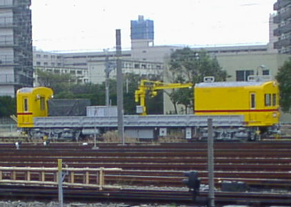 金沢検車庫のクト１。 線路沿いの公道より撮影。 投稿者自身がデジカメにて撮影。